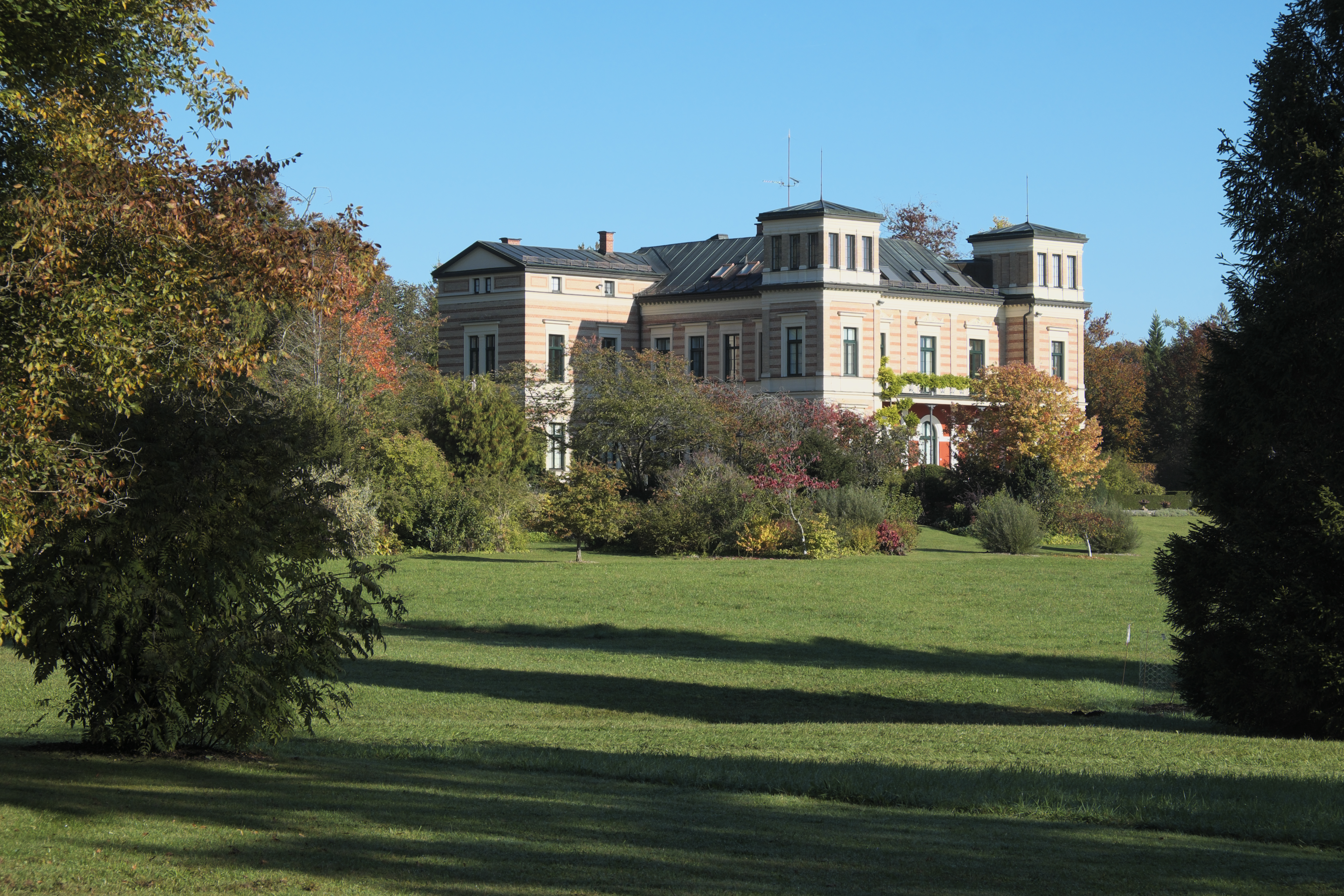 Schloss Seeseiten (Landhaus Ludwig von der Pfordtens) in Seeseiten (Seeshaupt) im Landkreis Weilheim-Schongau (Bayern/Deutschland)